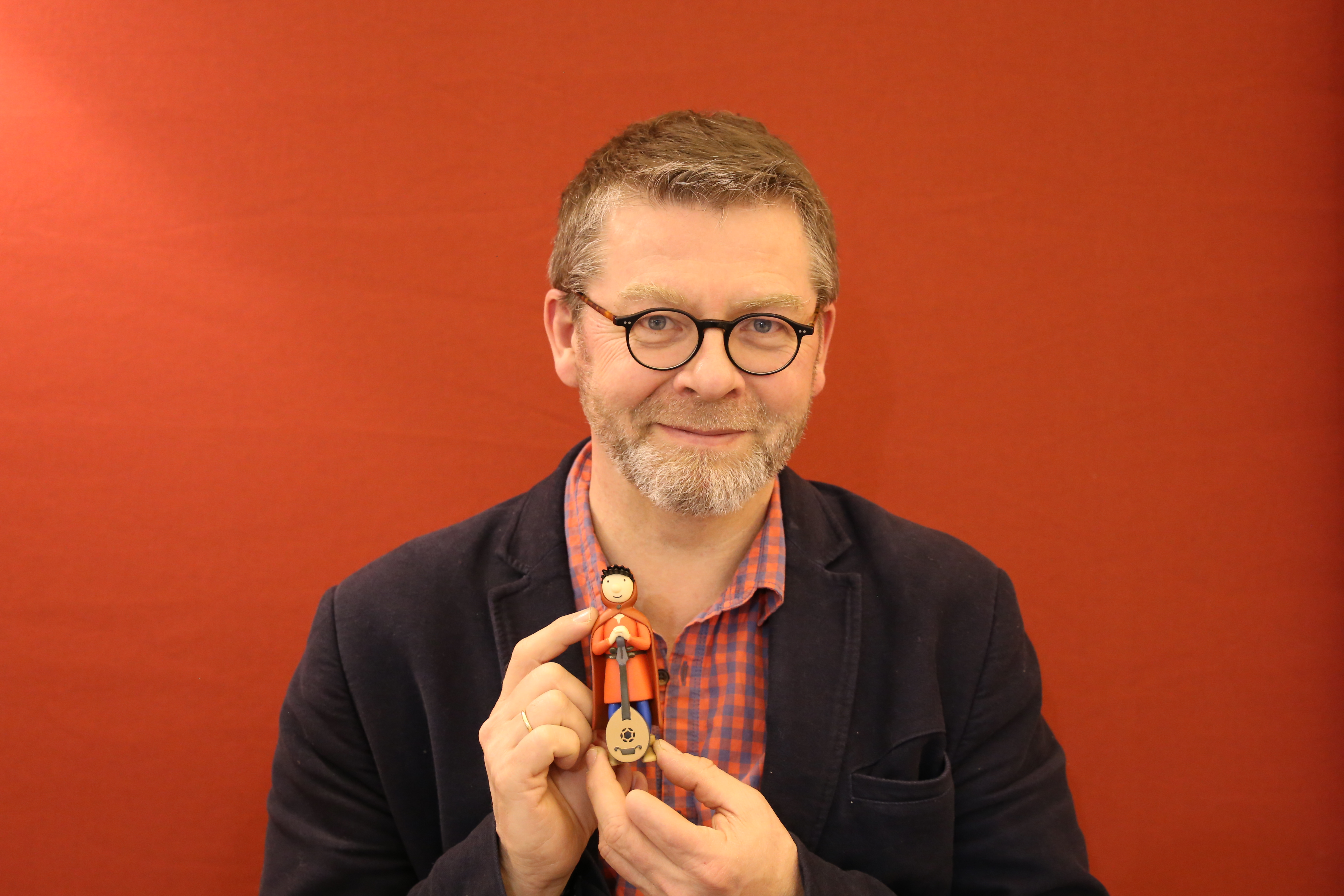 Jean-François Kieffer et son personnage emblématique, Loupio